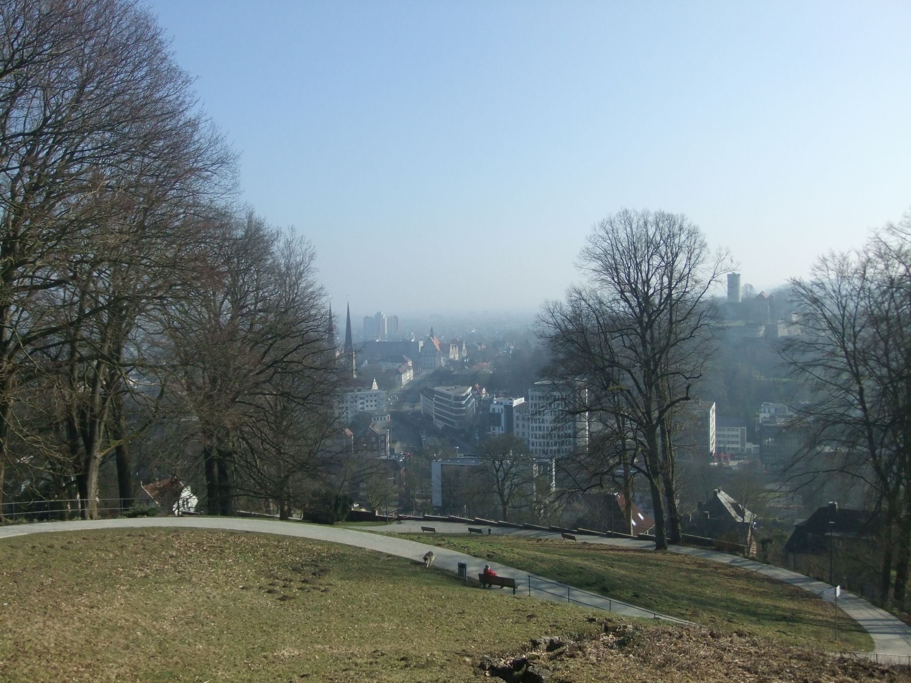 Winzerscher Garten Bielefeld